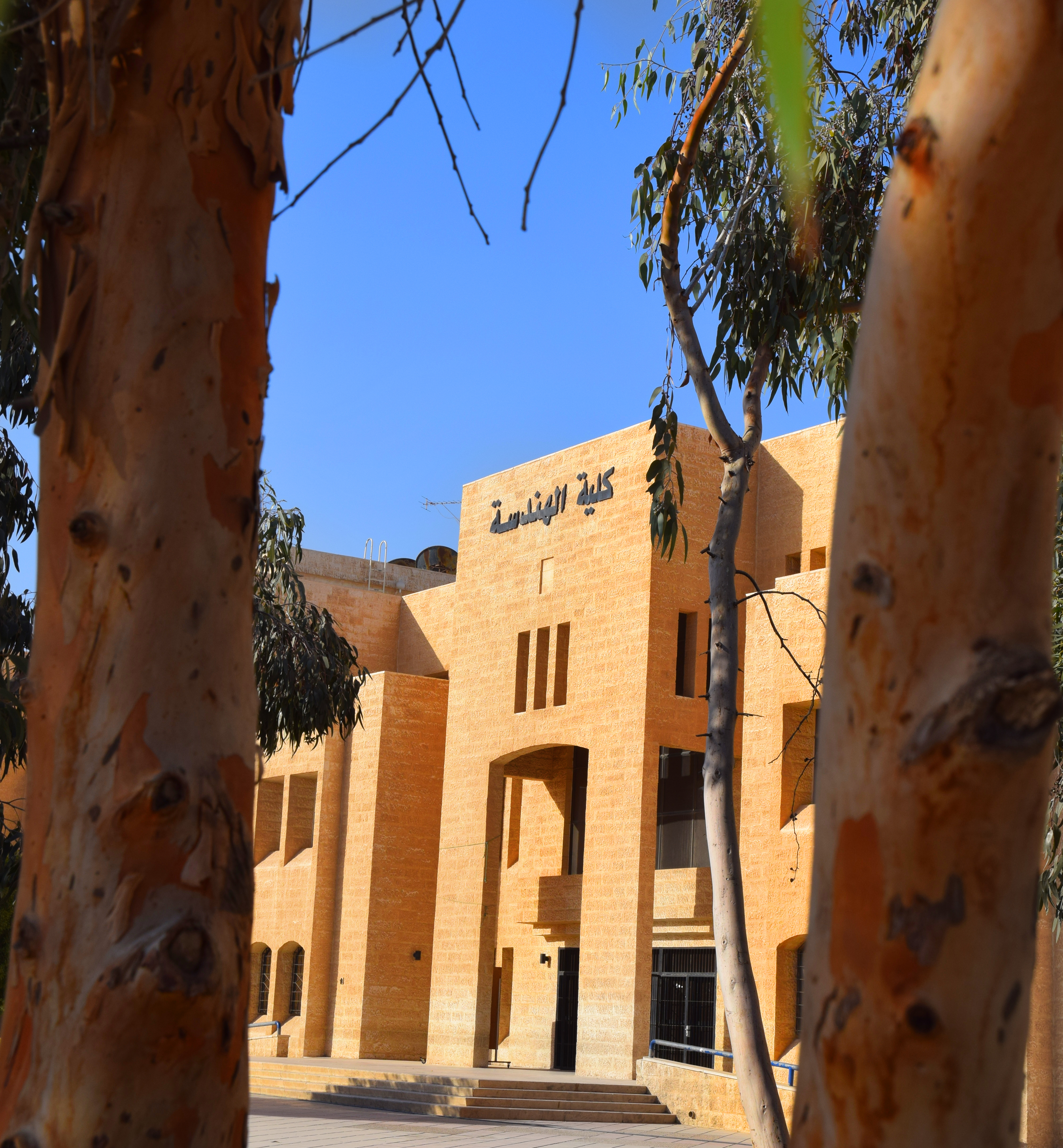 صور الجامعة الهاشمية